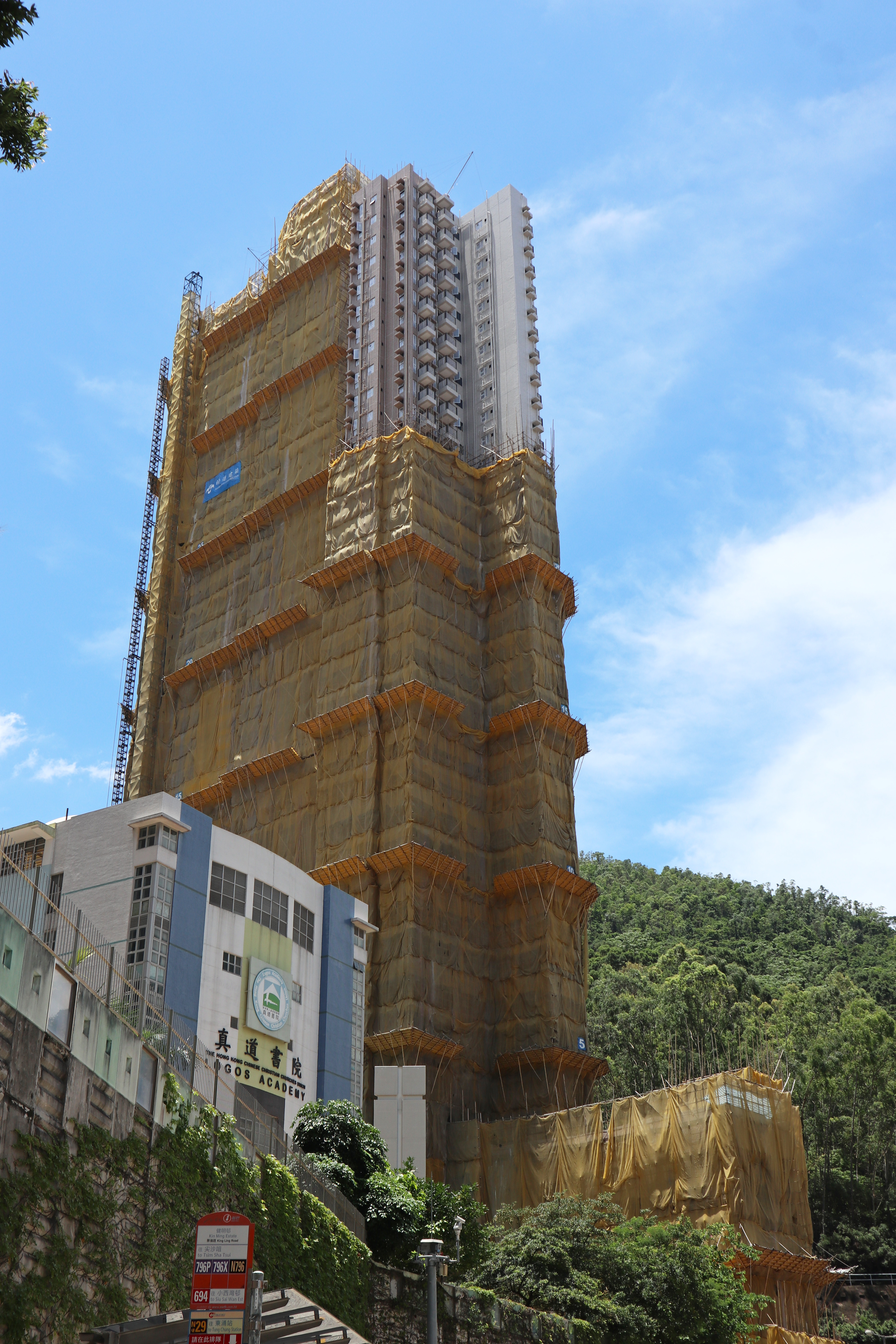 將軍澳調景嶺拆棚中的翠嶺峰